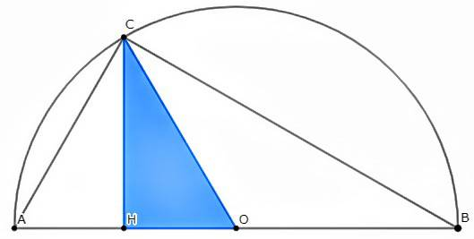 相似による証明